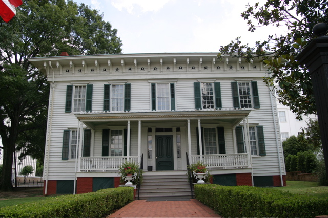 Blick auf das erste Weisse Haus der Konföderation in Montgomery, Alabama, U.S.A.